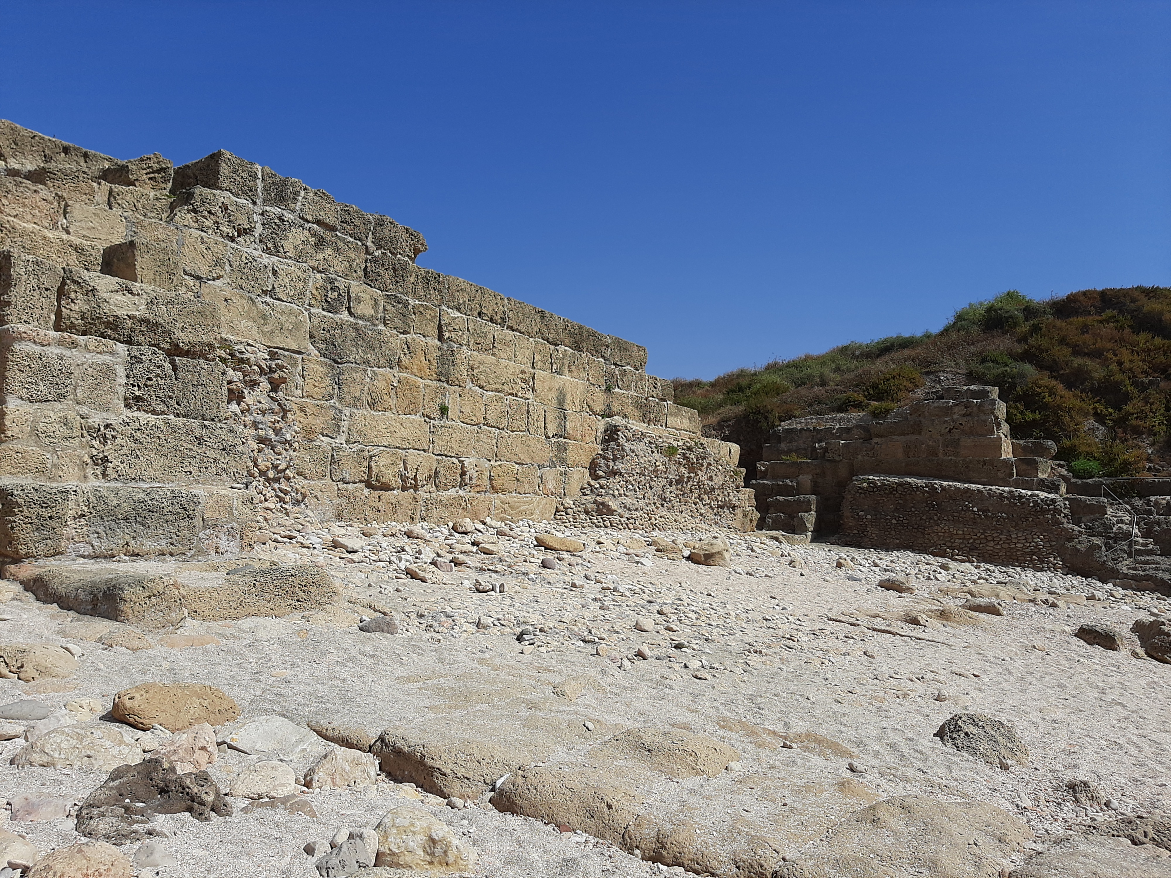 اثار في شاطئ خربة البرج تل دور التقطت الصورة بنفسي